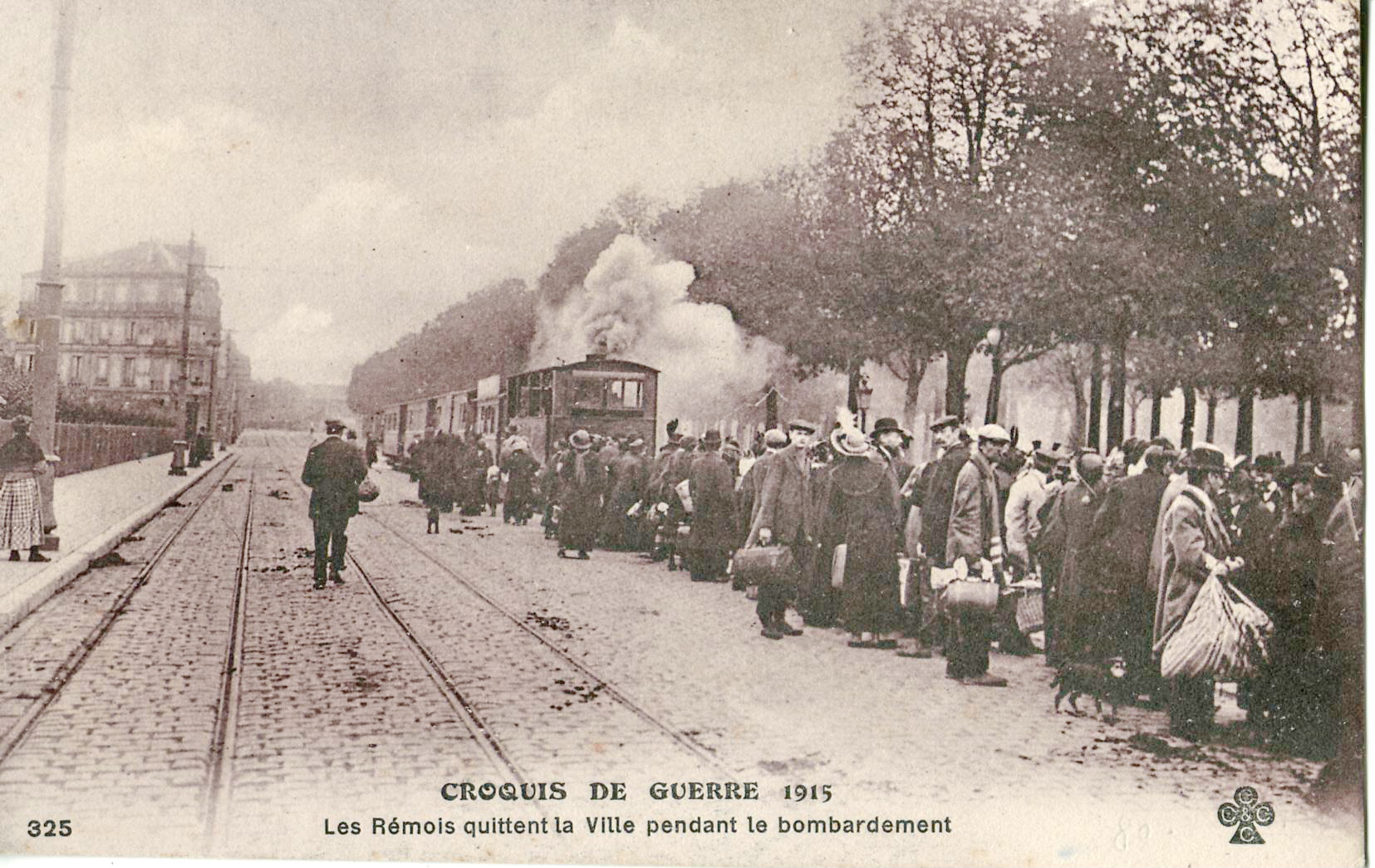 Carte postale ancienne éditée par CCCC, n°325 :CROQUIS DE GUERRE 1915 : Les Rémois quittant la Ville pendant le bombardement